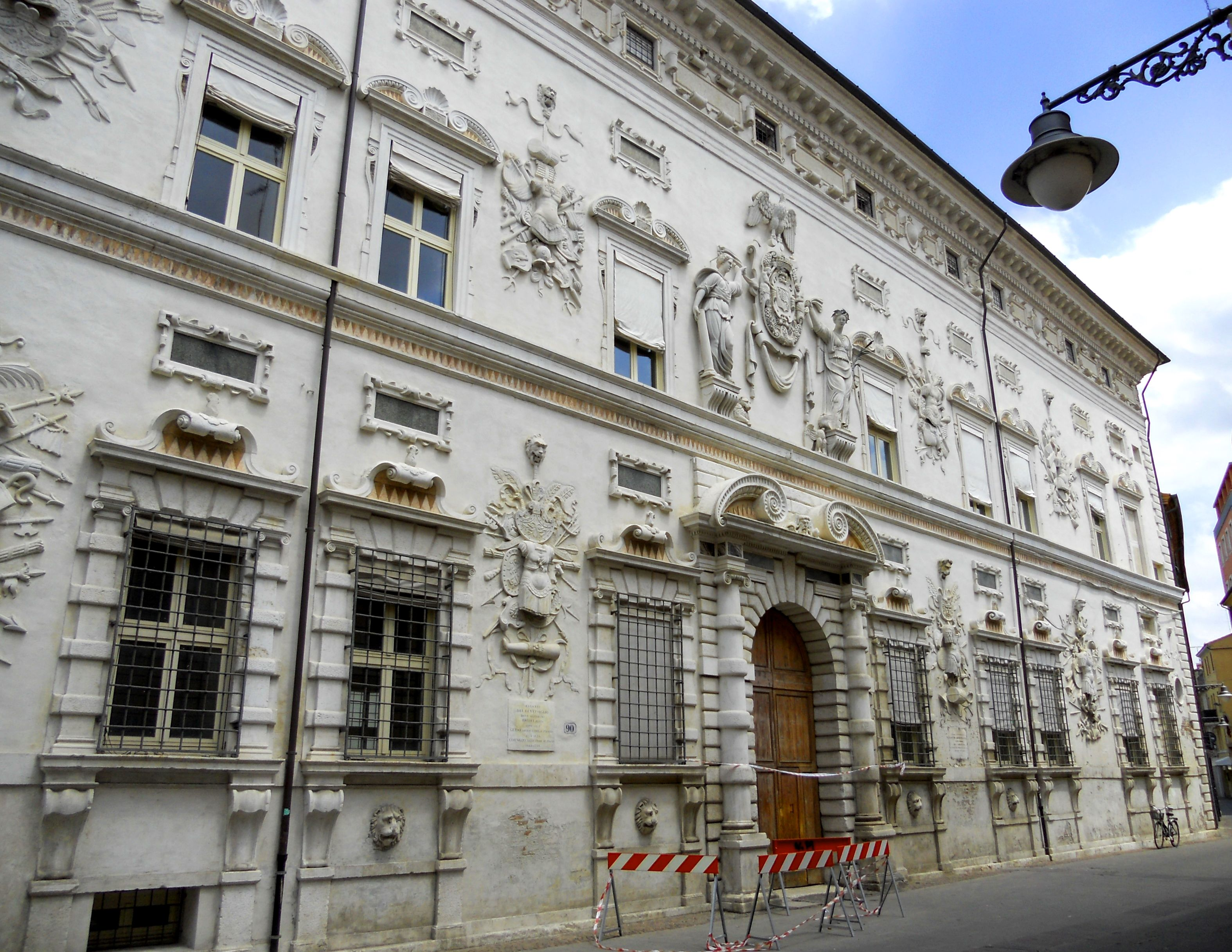 Palazzo Bentivoglio (Ferrara), facciata